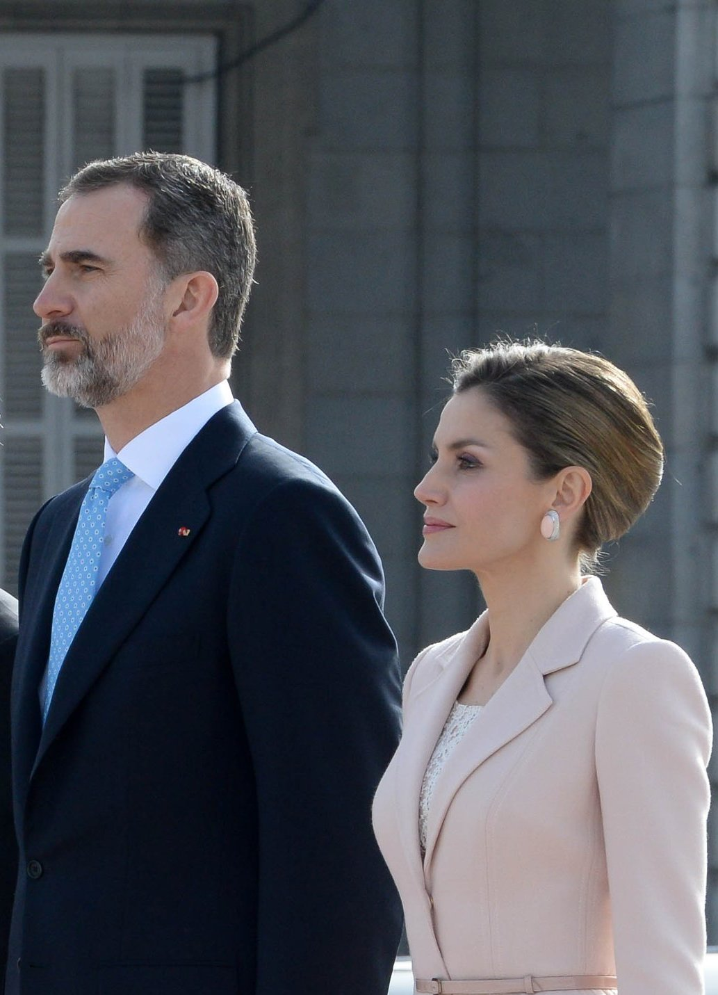 La primera dama Juliana Awada y la reina consorte de España, Letizia Ortiz dialogaron sobre los lazos que unen a ambos países y coincidieron en la importancia de trabajar en el cuidado de la niñez y el desarrollo integral de las mujeres.